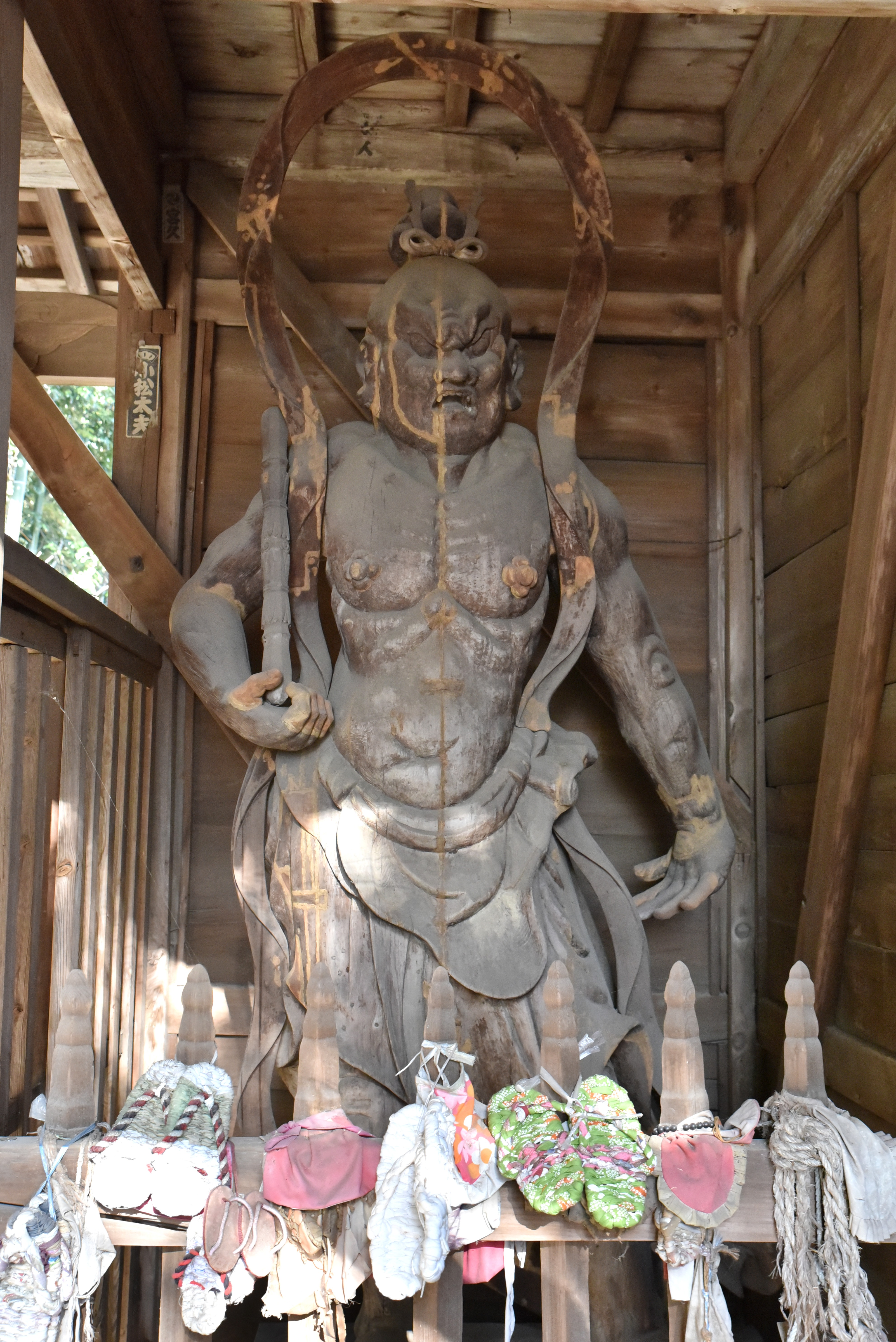 高讃寺の仁王像